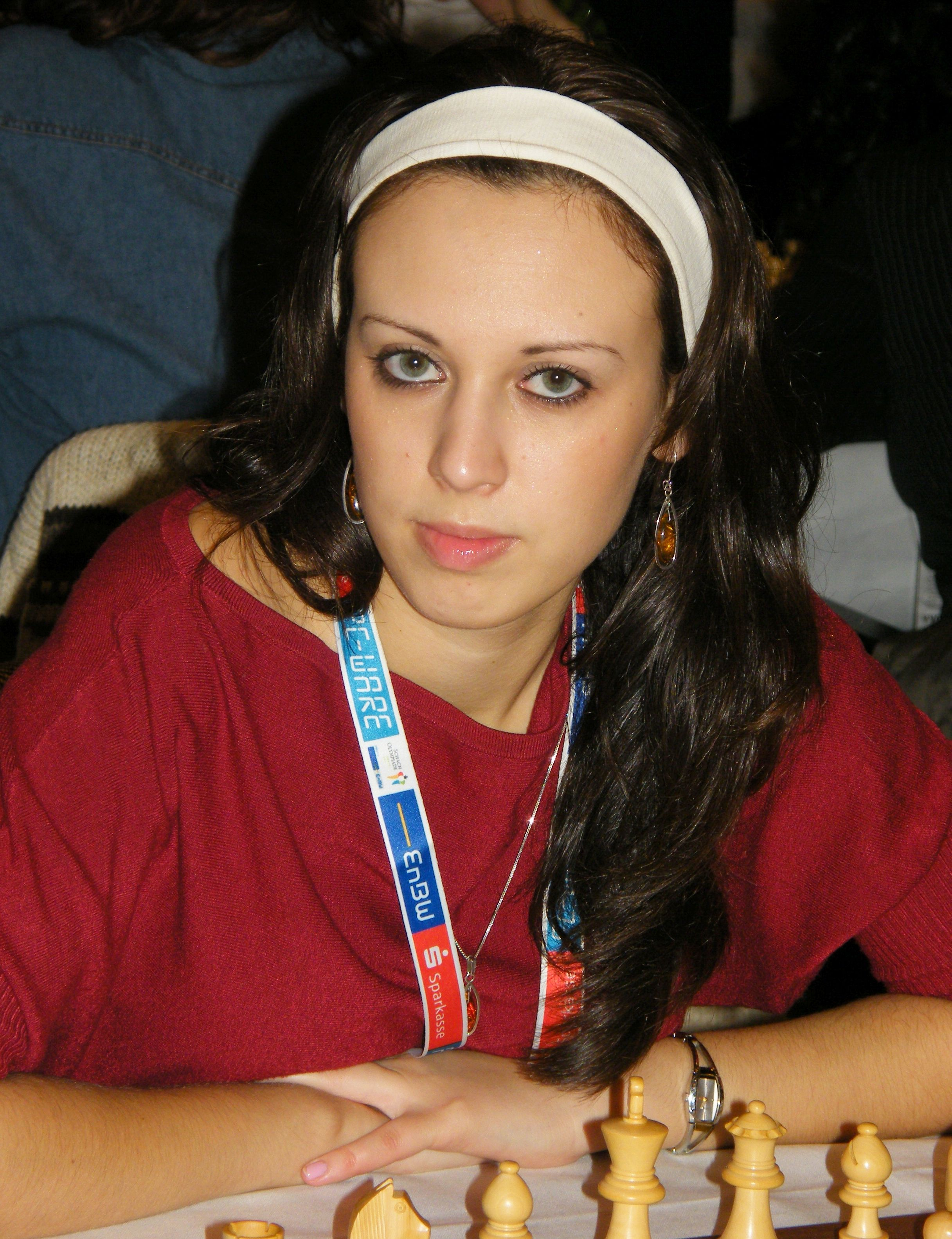 Dina Kagramanow bei der 38. Schacholympiade in Dresden 2008